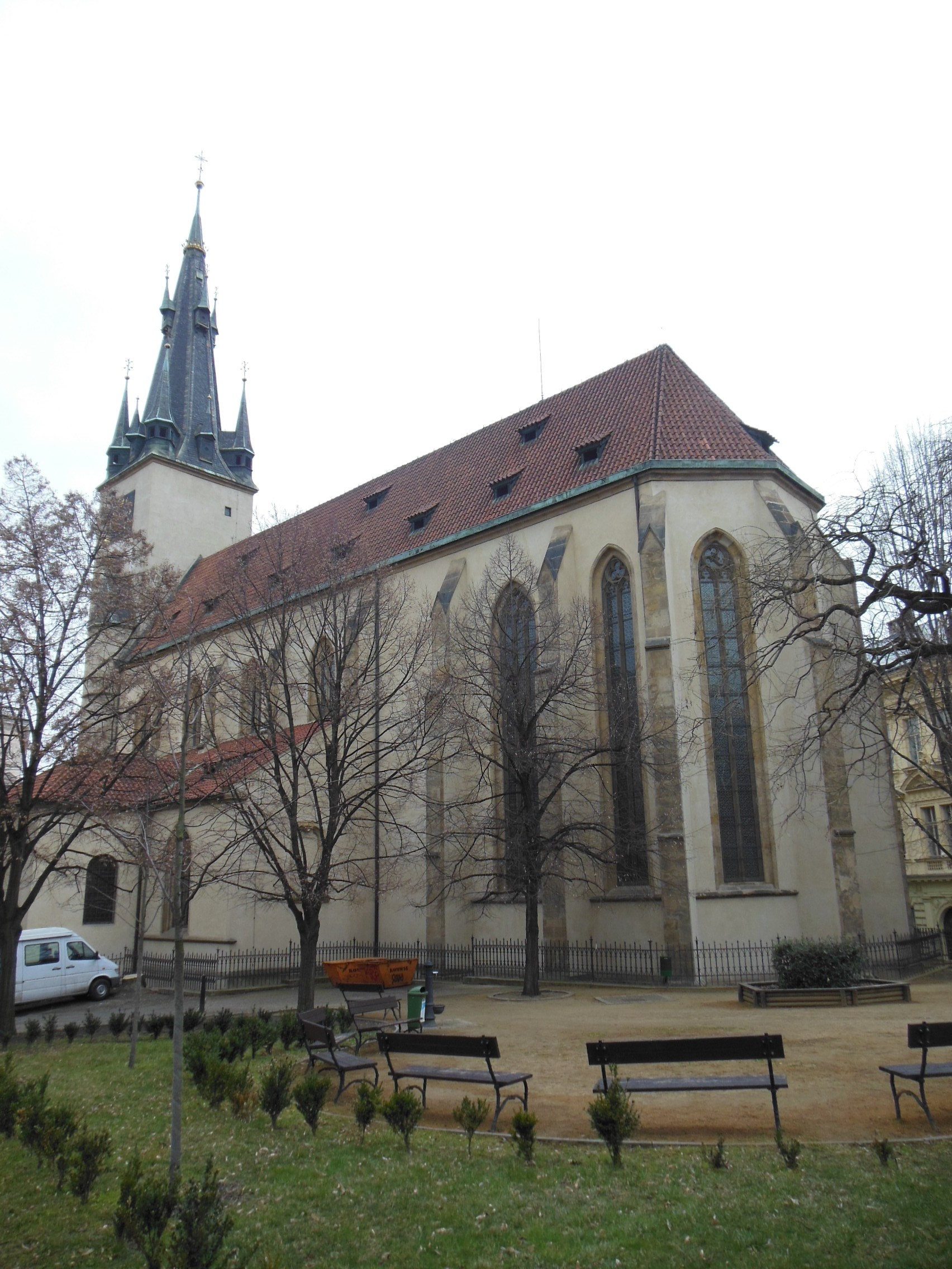 Kostel svatého Štěpána na Novém Městě v Praze.